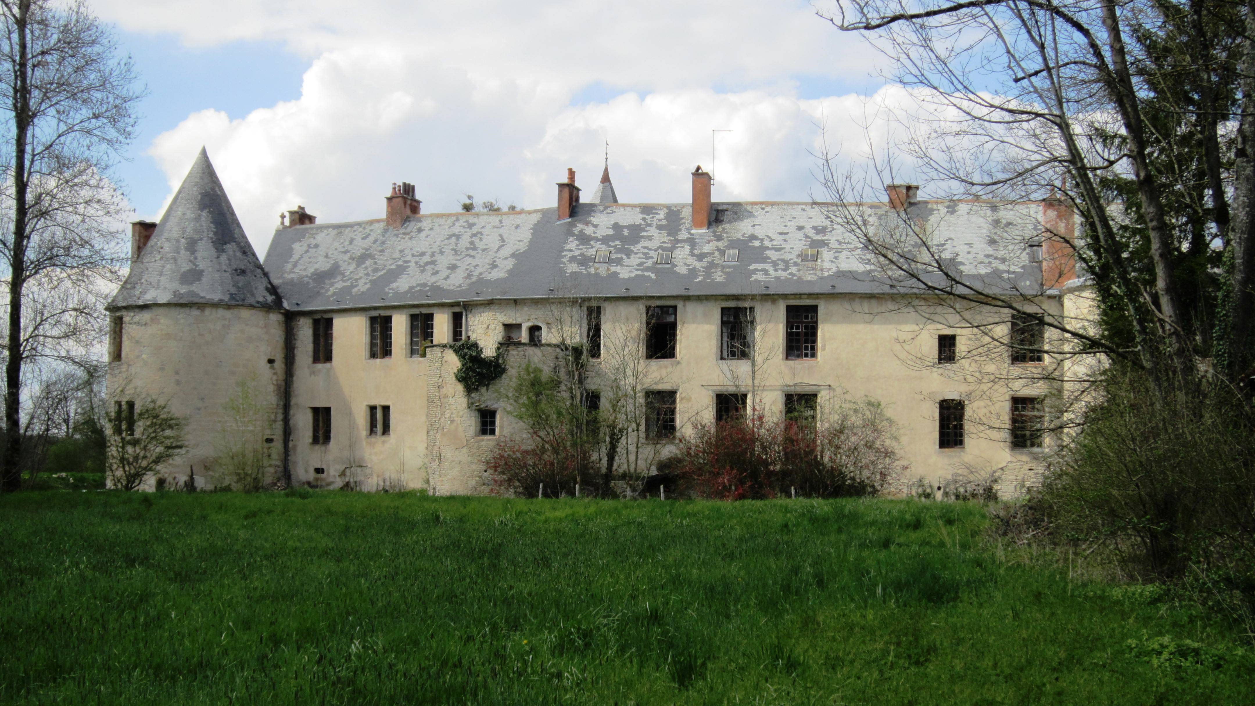 Château d'Autricourt (Côte-d'Or)